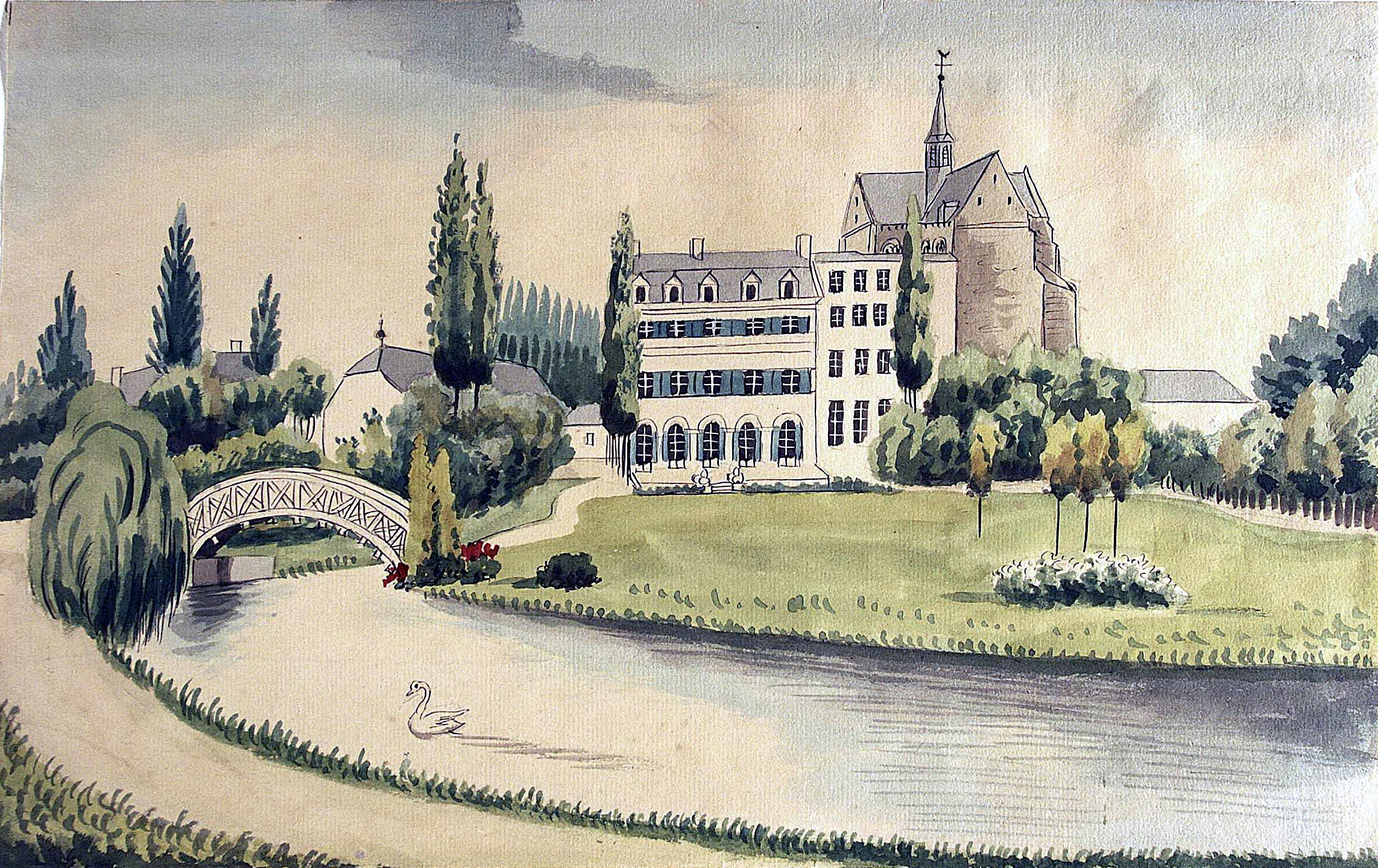 Ingekleurde tekening van Philippe van Gulpen van het Proosdijpark in Meerssen. Op de voorgrond de Geul. Op de achtergrond het voor Charles Roemers gebouwde landhuis, restanten van de Proosdij en de Sint-Bartolomeüskerk. Collectie Van der Noordaa in het RHCL Maastricht, CVDN 293.